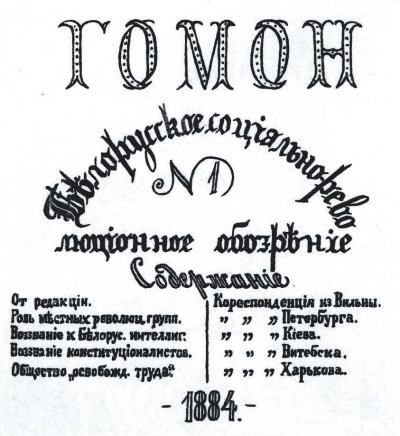 Беларуская (тарашкевіца): Тытул першай нелегальнай беларускамоўнай газэты Гомон, 1884, Менск.